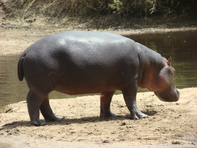 Hippopotame du parc de la Bénoué, dans la région du nord